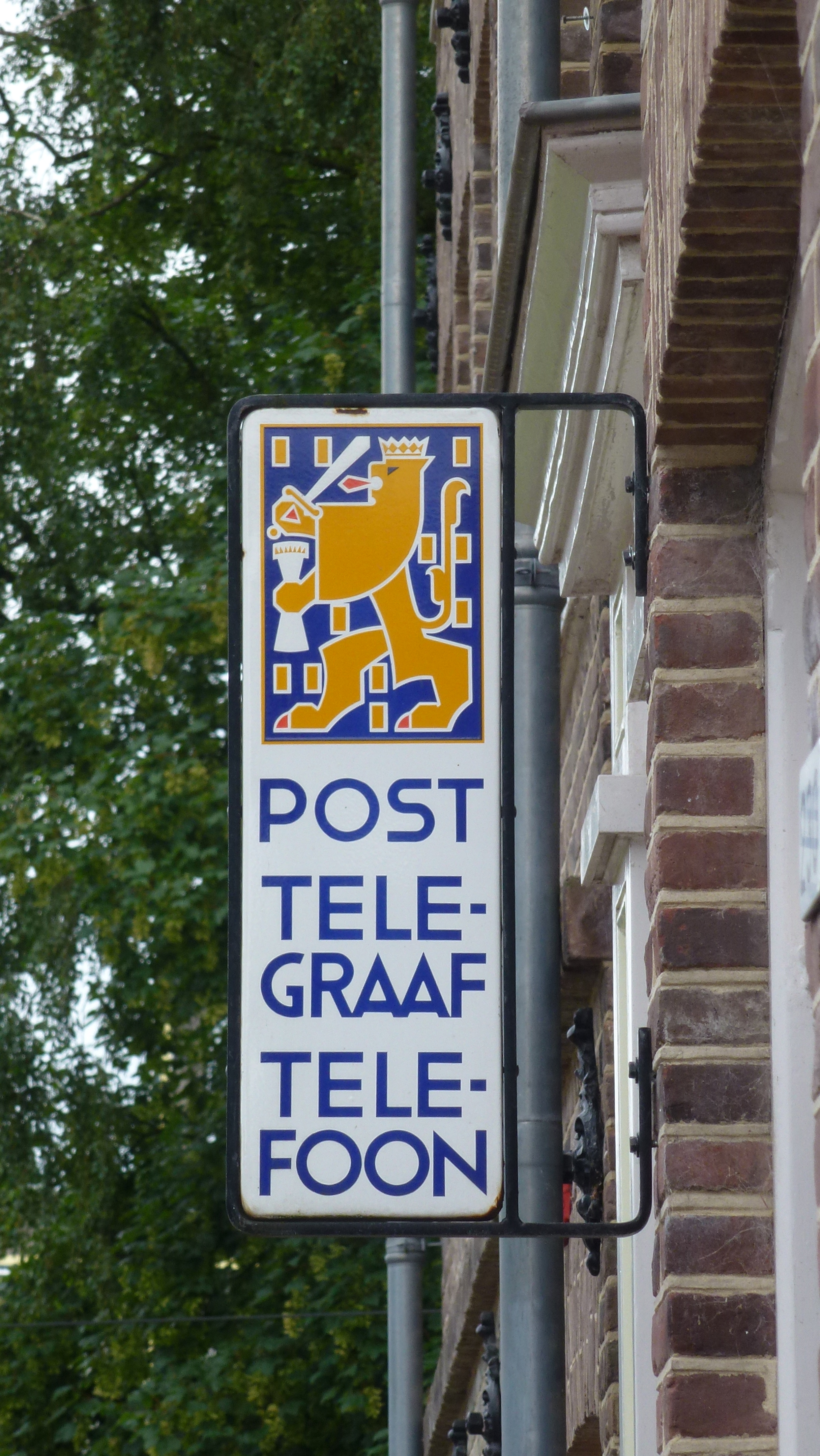 Uithangbord PTT, Post Telegraaf Telefoon uit 1937. Ontworpen door Nicolaas de Koo. Het bord is er een uit een serie van vijf. De fabrikant is Emaillefabriek Langcat, Bussum. Fotolocatie: Nederlands Openluchtmuseum in Arnhem